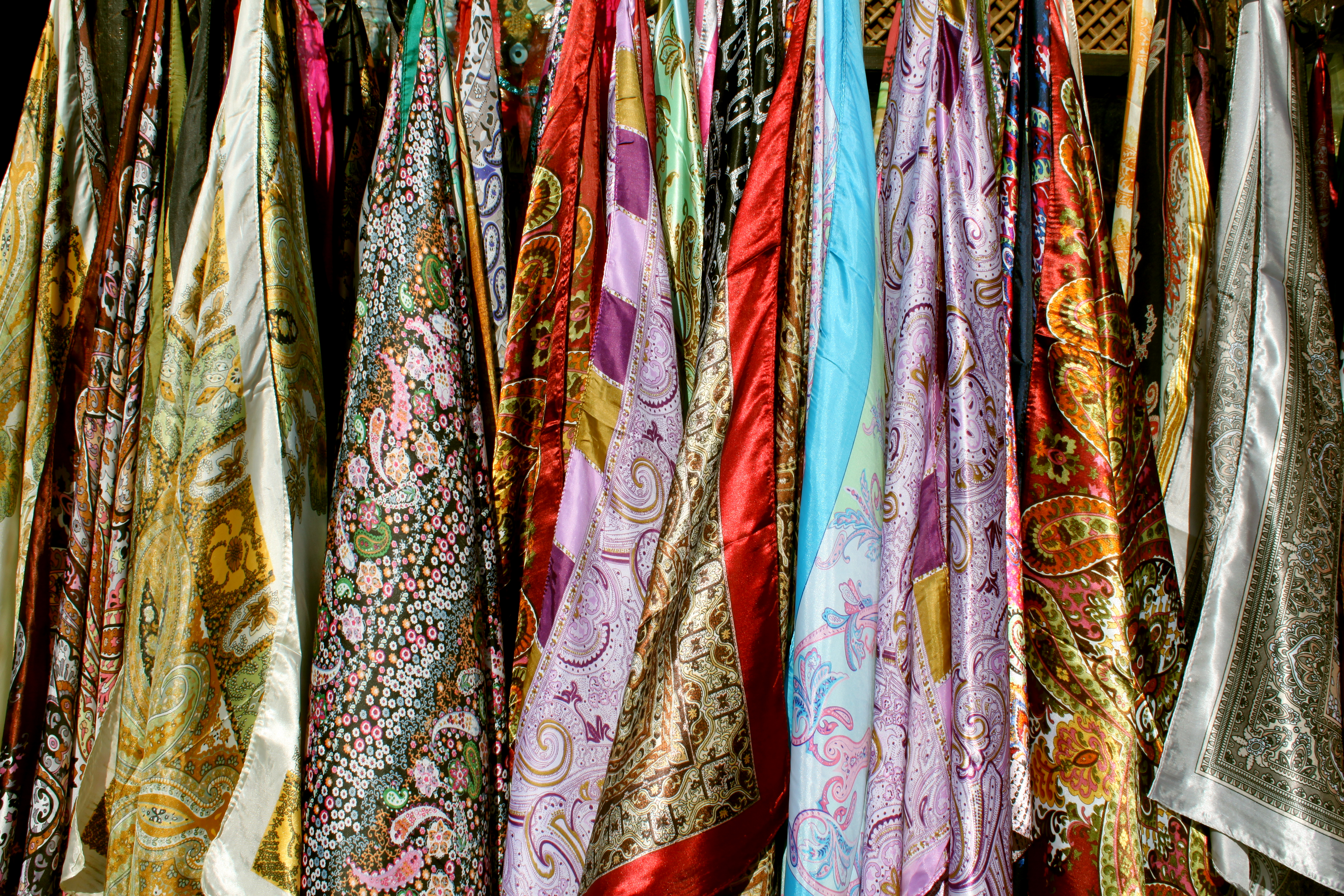 Azərbaycan ipəyindən kəlağayılar